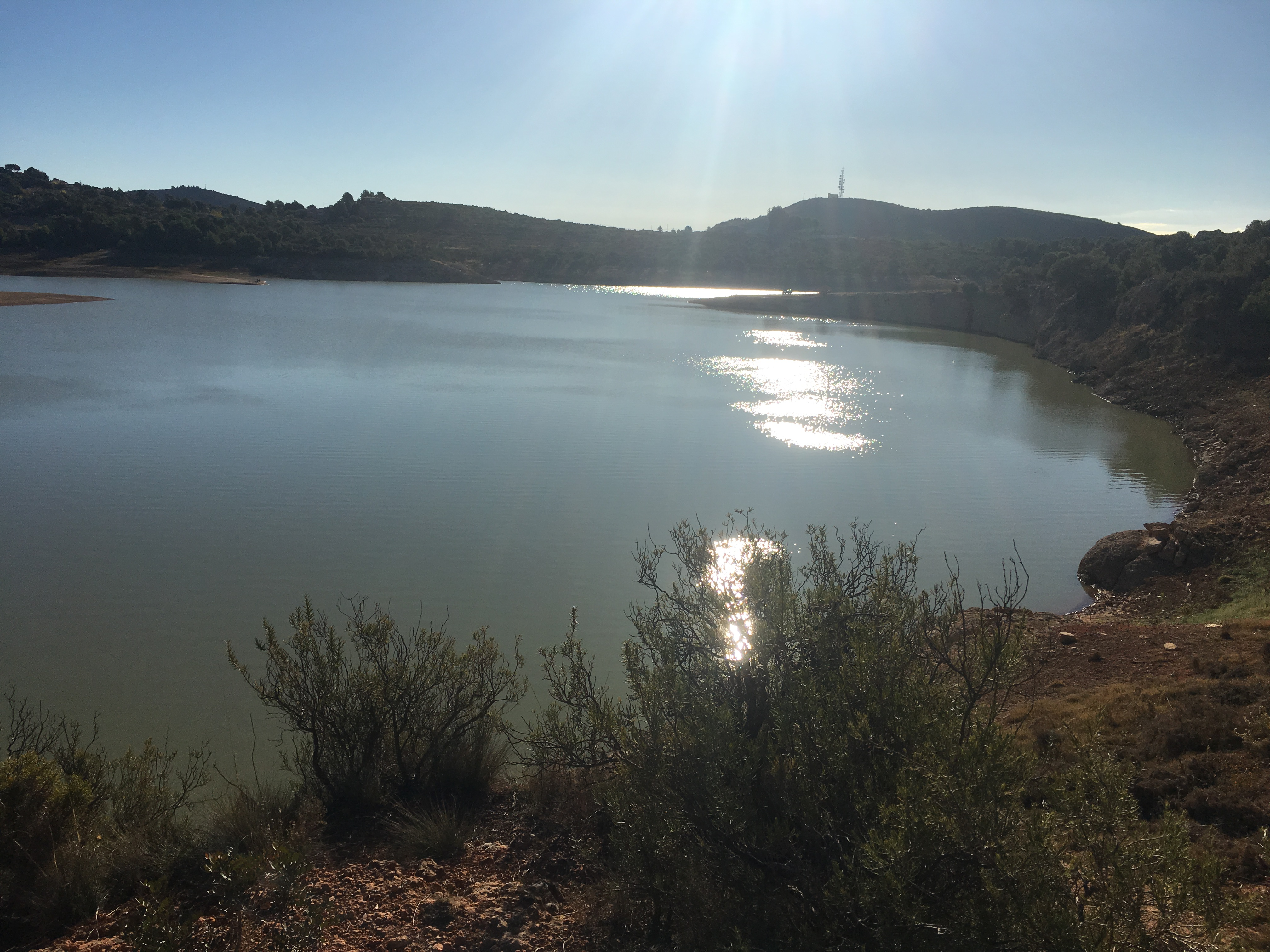 Paisatje del pantà Maria Cristina